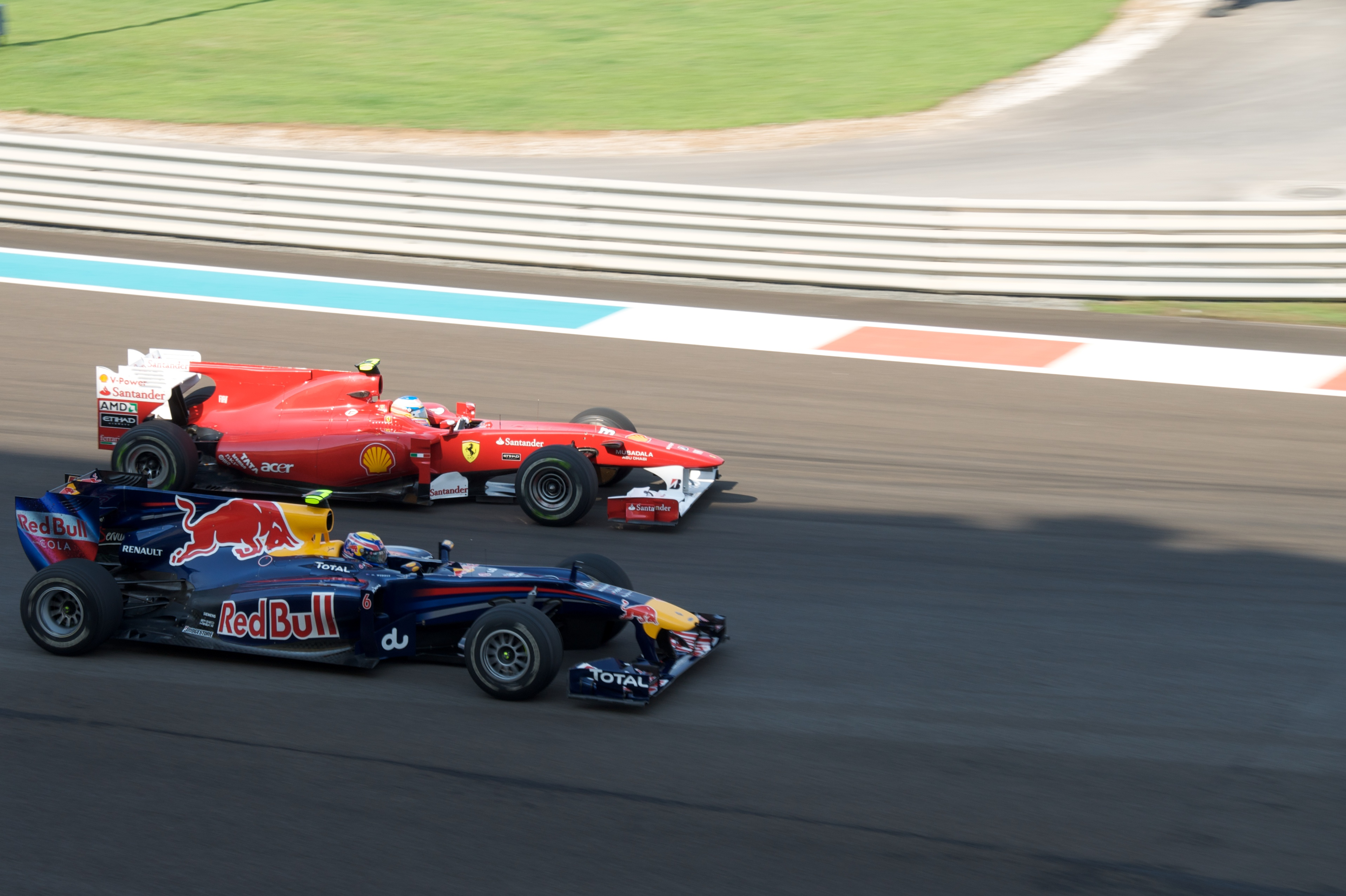 Webber Alonso GP Abu Dabi 2010